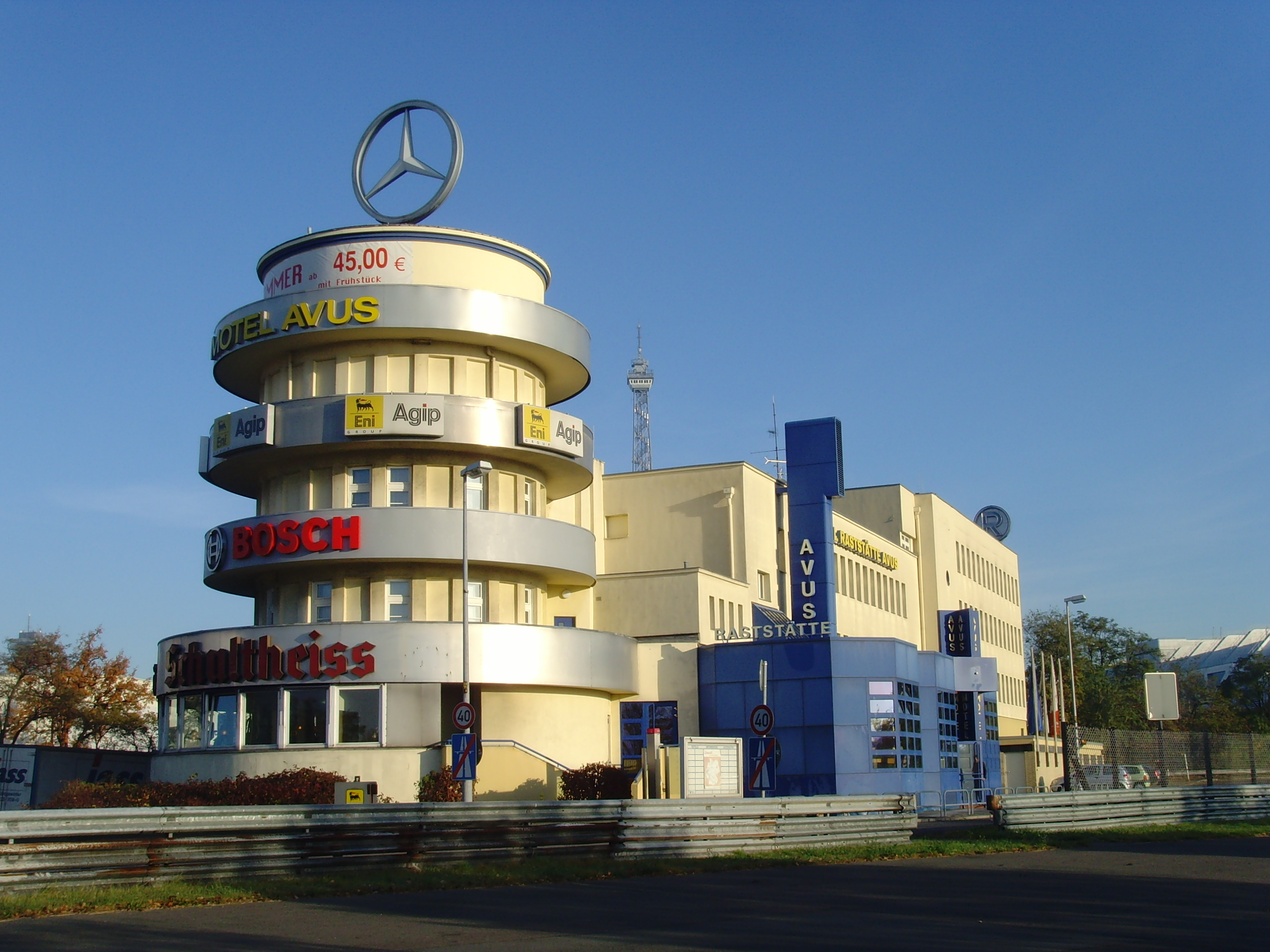 Motel AVUS Berlin